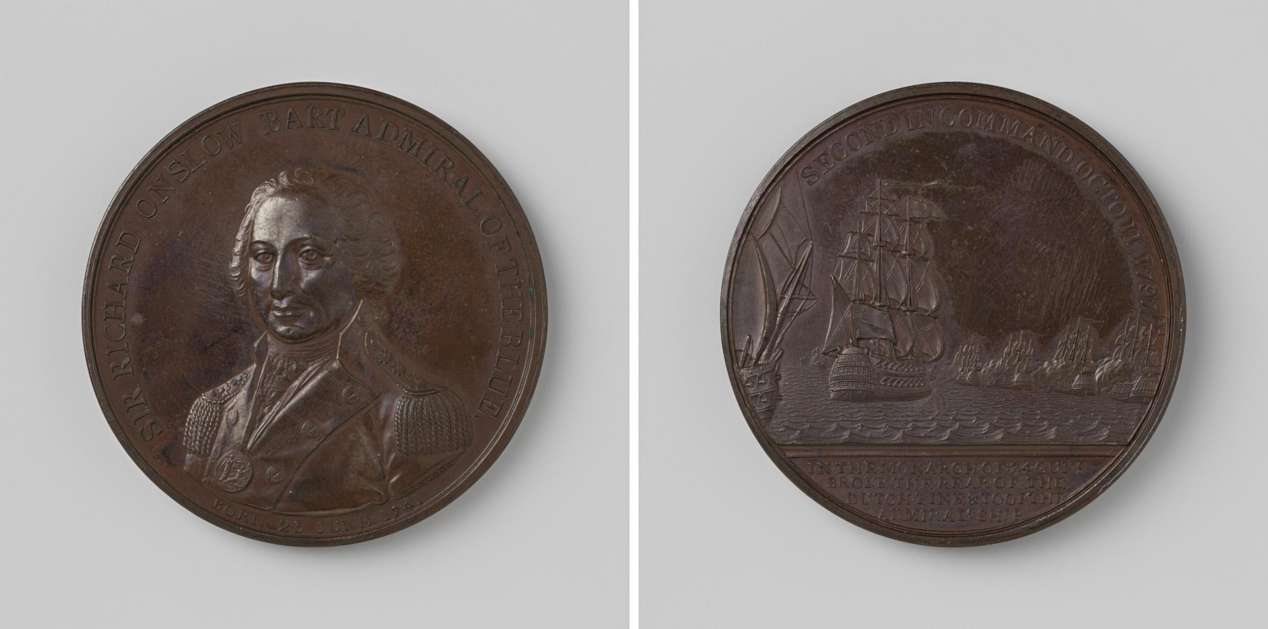 IdentificatieTitel(s): Slag bij Kamperduin, ter ere van Richard Onslow, veroveraar van het Nederlandse admiraalsschipObjecttype: historiepenning Objectnummer: NG-VG-1-3062Omschrijving: Bronzen penning. Voorzijde: borststuk man binnen omschrift. Keerzijde: schip van Onslow, gevolgd door tweede Engels schip vaart op vier Nederlandse schepen af binnen binnen omschrift; afsnede: opschriftVervaardigingVervaardiger: John Gregory Hancock (Sr.)Plaats vervaardiging: BirminghamDatering: 1797Materiaal: brons Techniek: slaanAfmetingen: d 4,9 cm. × g 614 grOnderwerpWat: Franse RevolutieEerste Coalitie-oorlogZeeslag bij KamperduinWanneer: 1797-10-11 - 1797-10-11Waar: KamperduinWie: Richard OnslowVerwerving en rechtenCredit line: Schenking van mevrouw J.M. van Gelder-NijhoffVerwerving: schenking 1885Copyright: Publiek domein